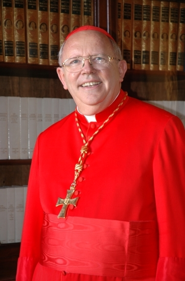 Le cardinal Jean-Pierre Ricard